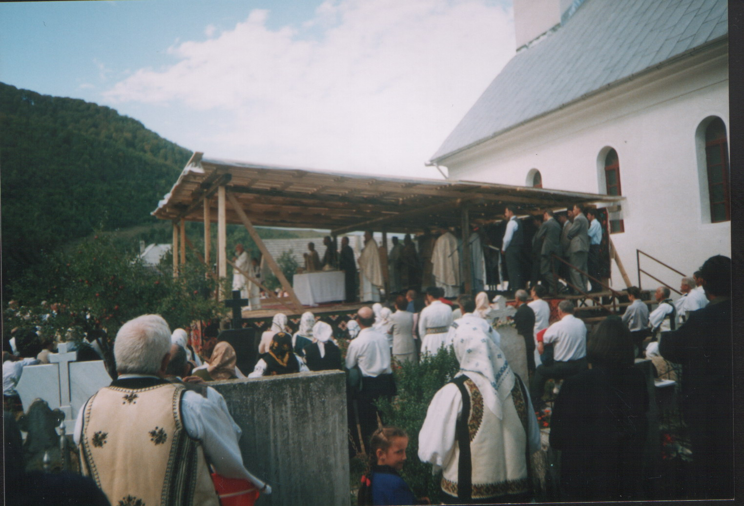 IPS Bartolomeu 2 (foto 07.09.2003)